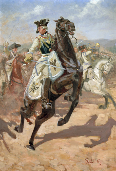 Friedrich Wilhelm Seydlitz. Obra de Richard Knötel